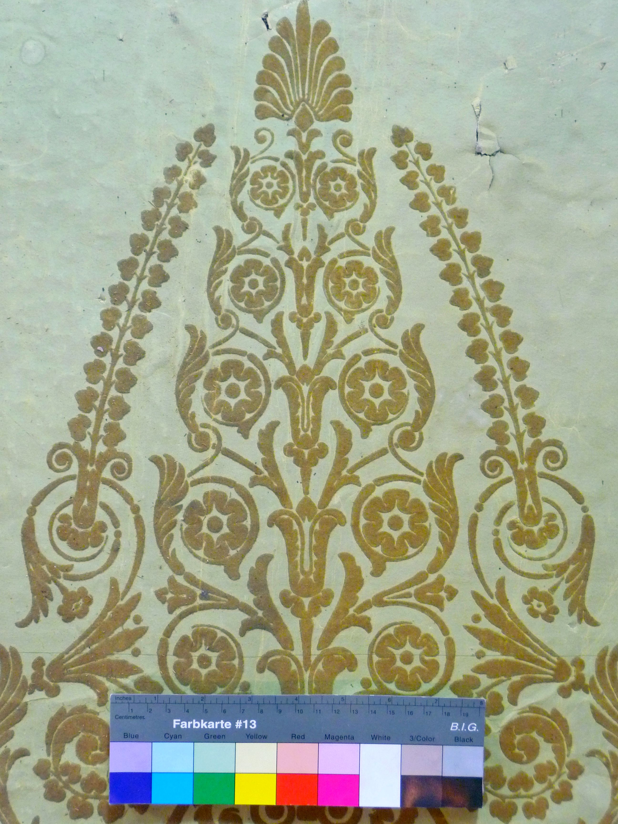 Detail aus dem Mittelteil der Musikzimmertapete nach Oberflächenreinigung. Auf einem hellgrünen Fond wurde eine Beflockung durchgeführt: Dabei wurde das Rankenmotiv als Klebeschicht aus Leinöl und Bleiweiß aufgedruckt. Über der Klebeschicht wurden klein geschnittene, oliv gefärbte Hanffasern verwirbelt und die Reste nach Duchtrocknung abgefegt. Die Farben der Beflockung waren ursprünglich farbintensiver und sind durch Lichteinfluß ausgeblichen.